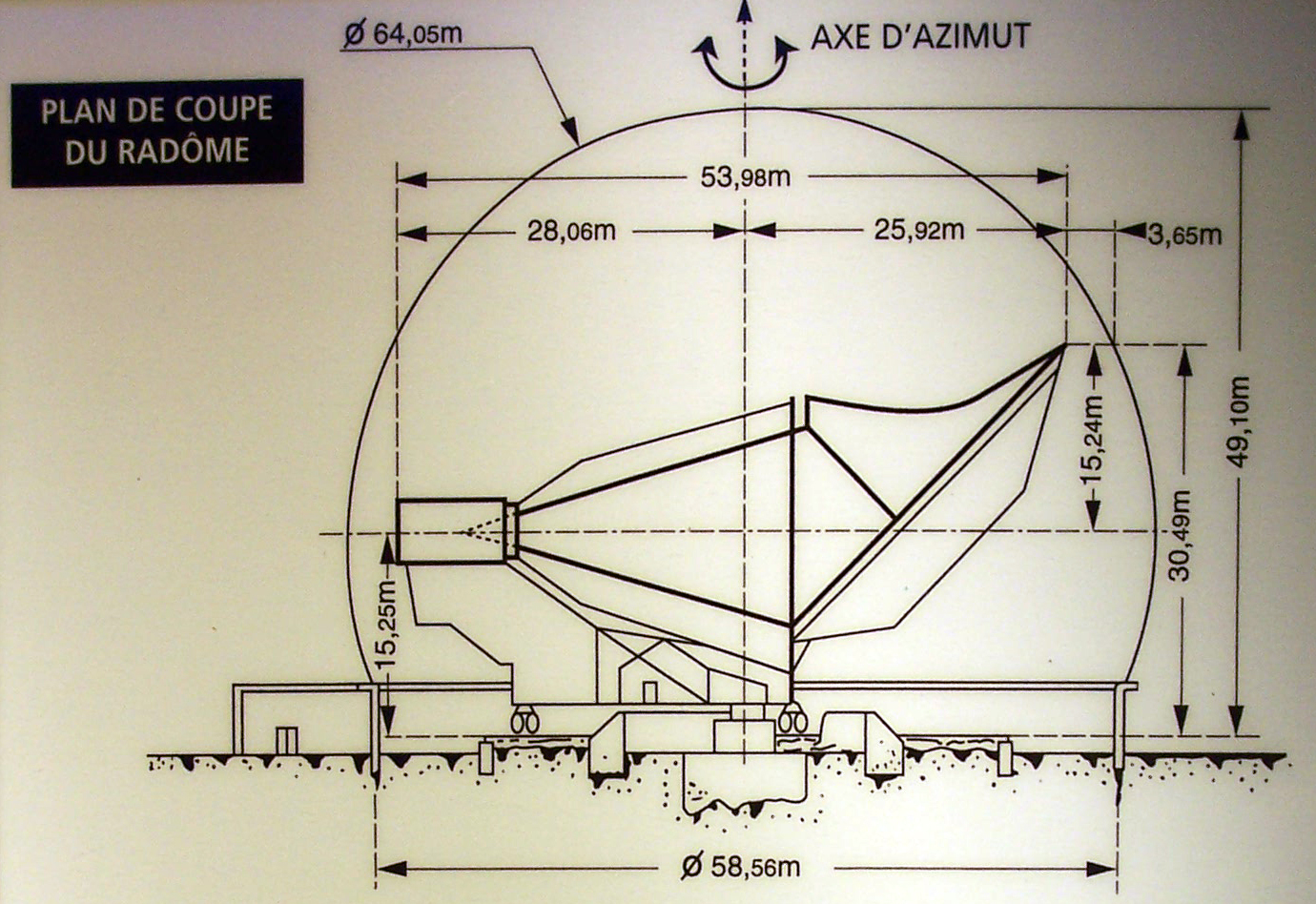 Plan Coupe Radome Pleumeur-Bodou